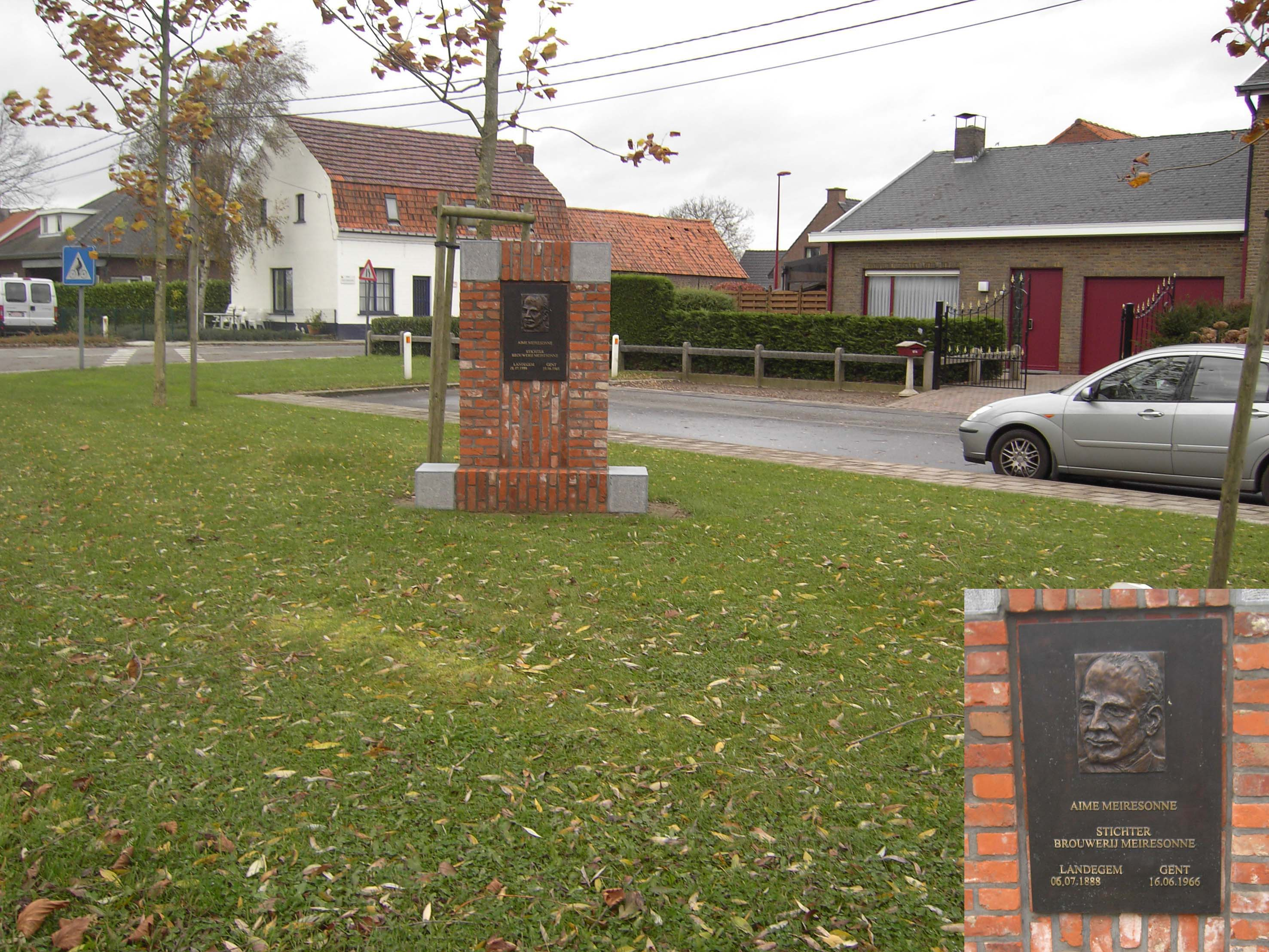 Aimé Meiresonne was brouwer te Landegem tot 1918, daarna te Gent tot 1966. Brouwerij Meiresonne was een van de grotere brouwerijen in Vlaanderen. (Oost-Vlaanderen - België).